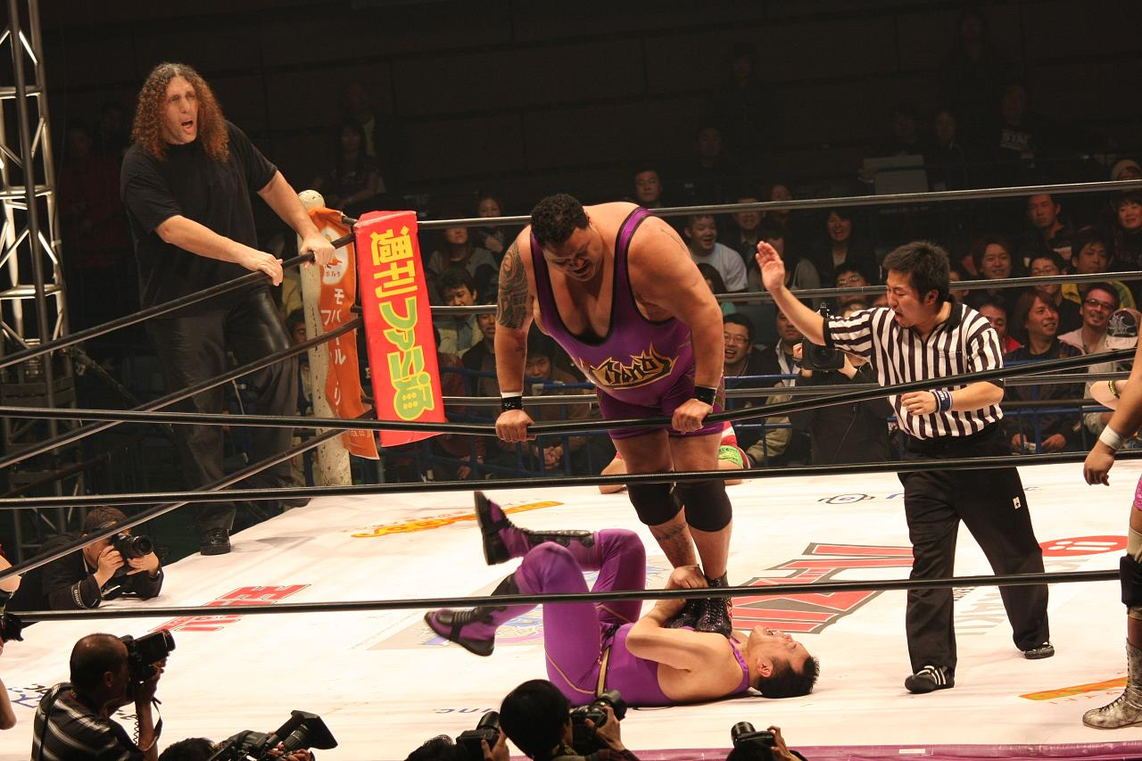 Akebono